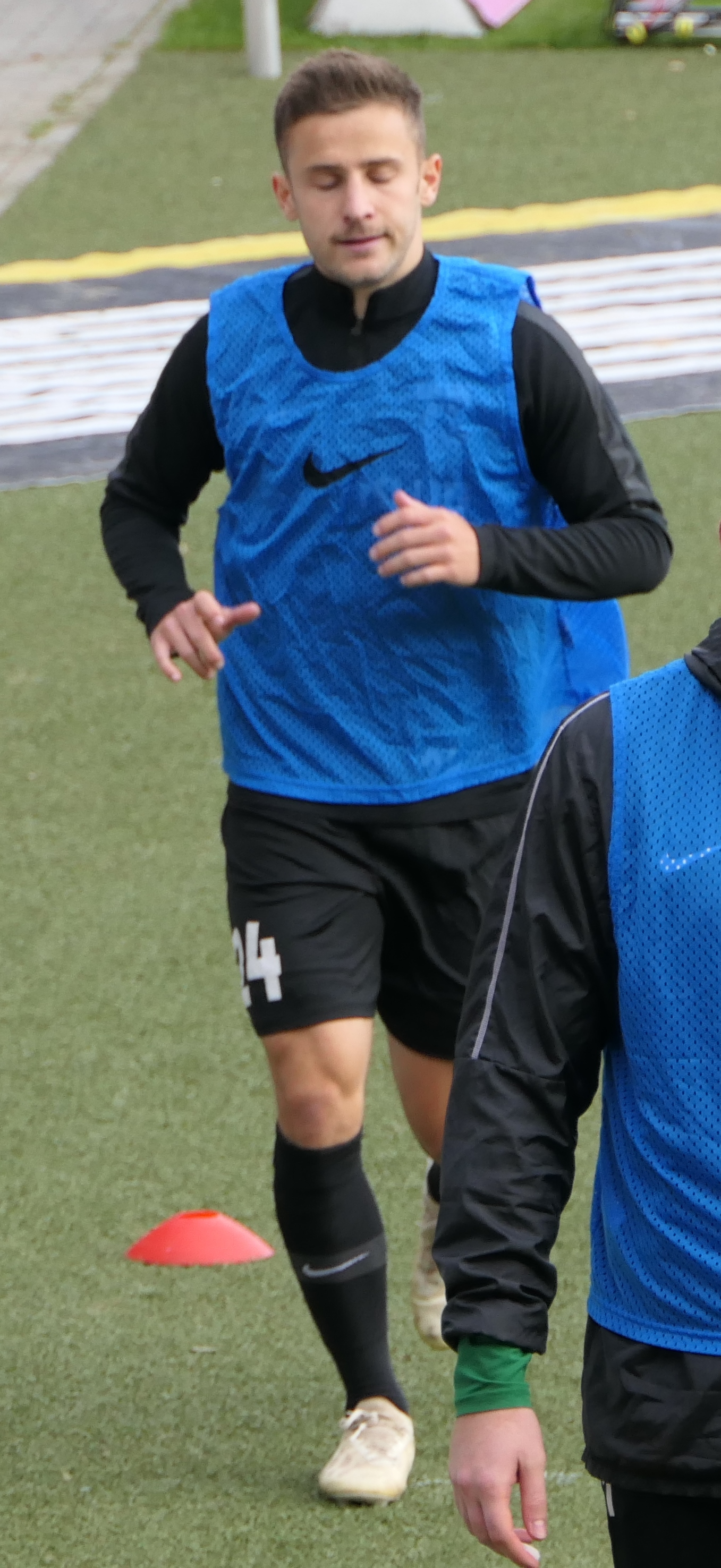 Der Fussballprofi Yannick Thermann von der SG Sonnenhof Großaspach beim Heimspiel gegen Eintracht Braunschweig am 03.11.2018.